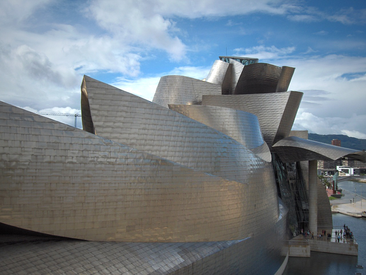 Guggenheim museum in Bilbao, Spain